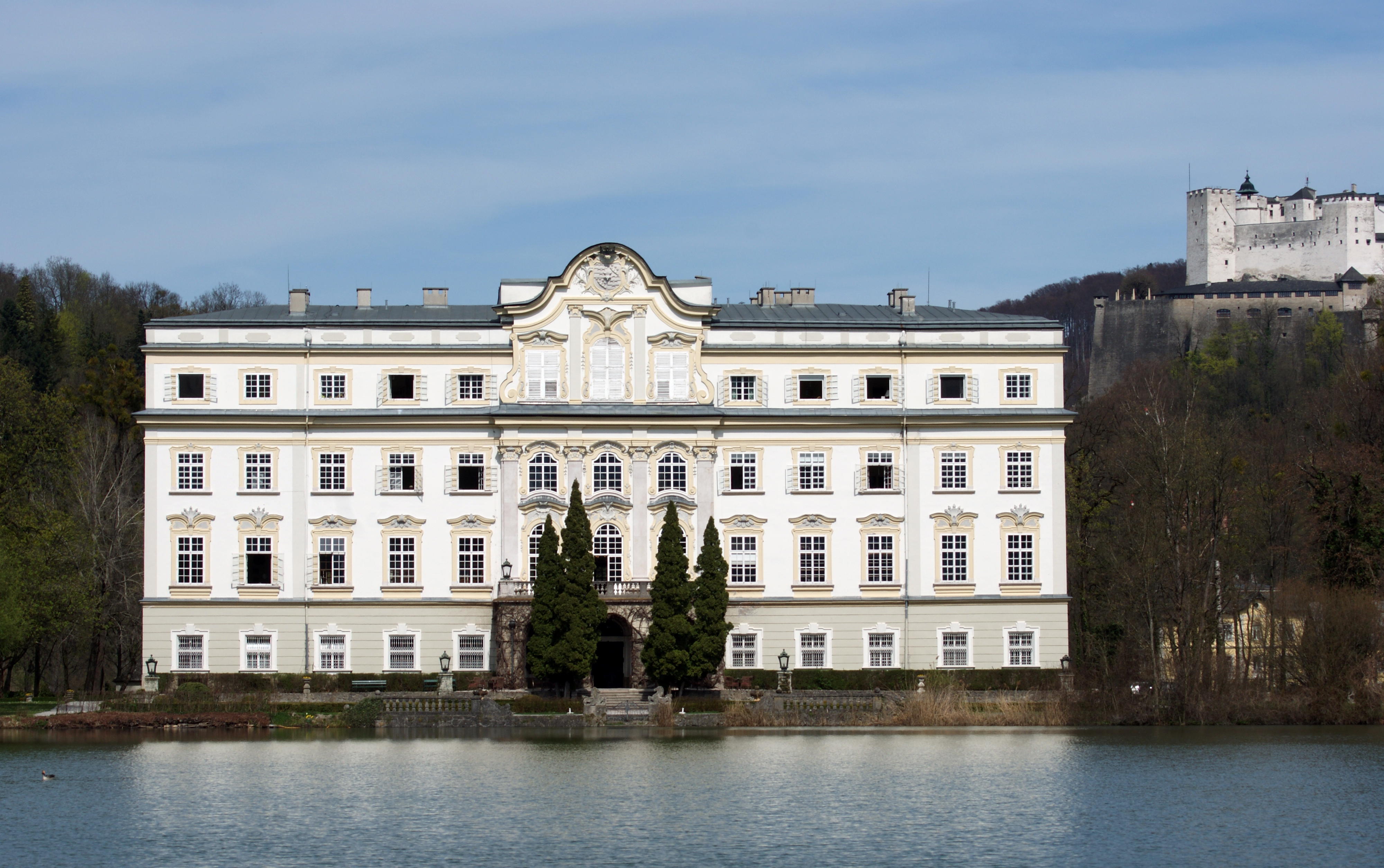 Schloss Leopoldskron mit Leopoldskroner Weiher, Hohensalzburg Festung, Leopoldskron, Salzburg, Österreich